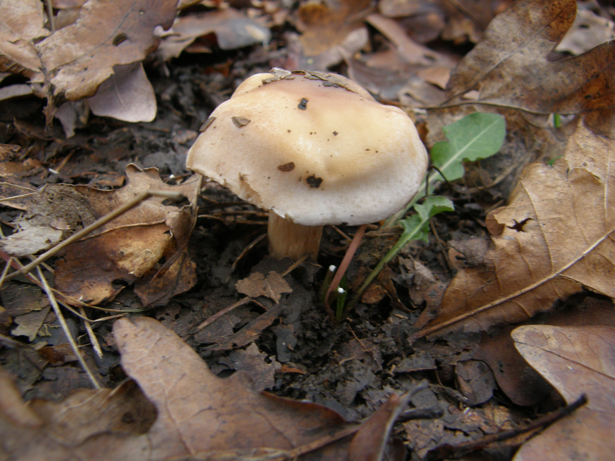 Гриб в Донецке